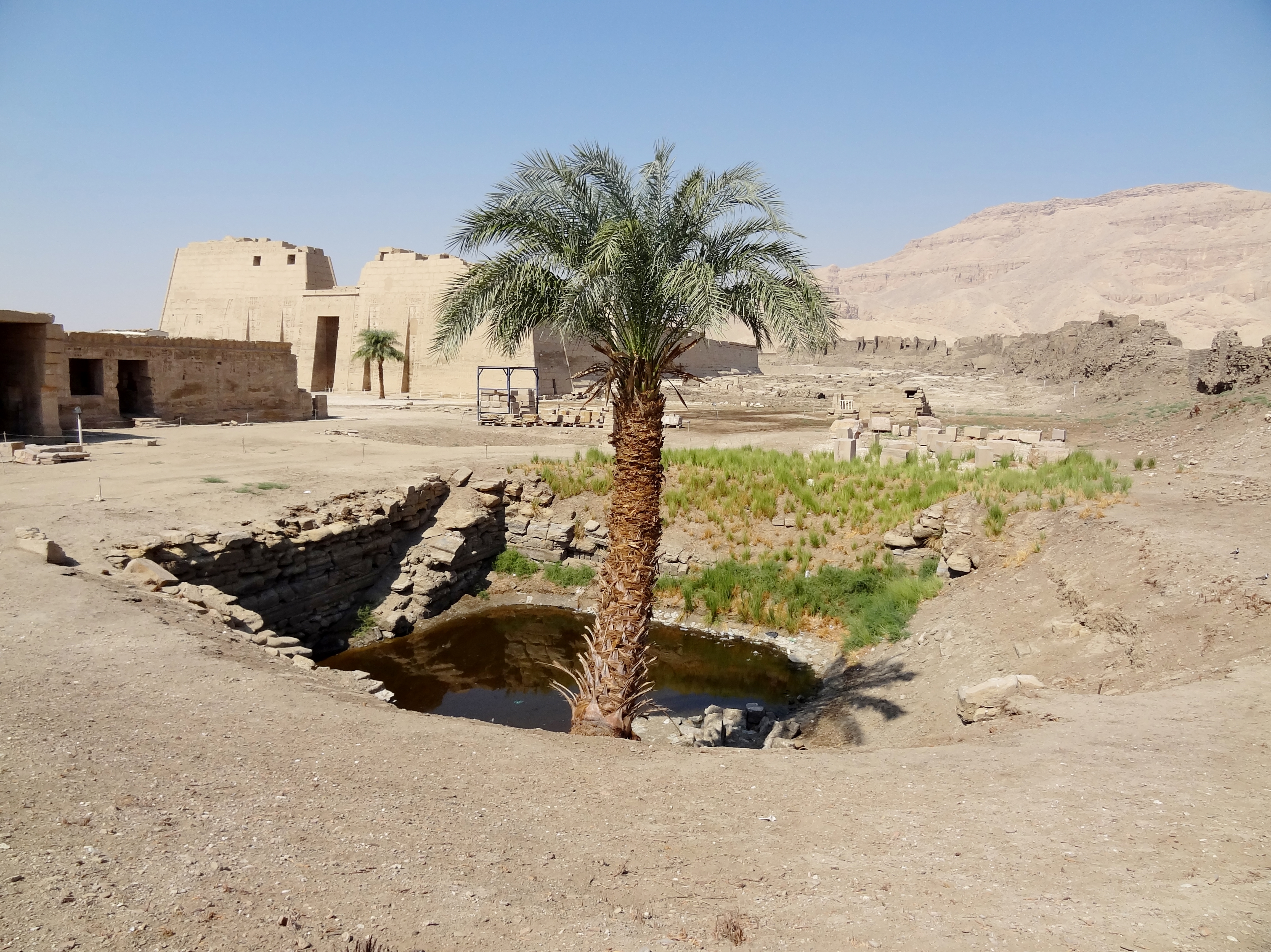 Heiliger See vor dem Totentempel Ramses’ III. in Medinet Habu, Ägypten